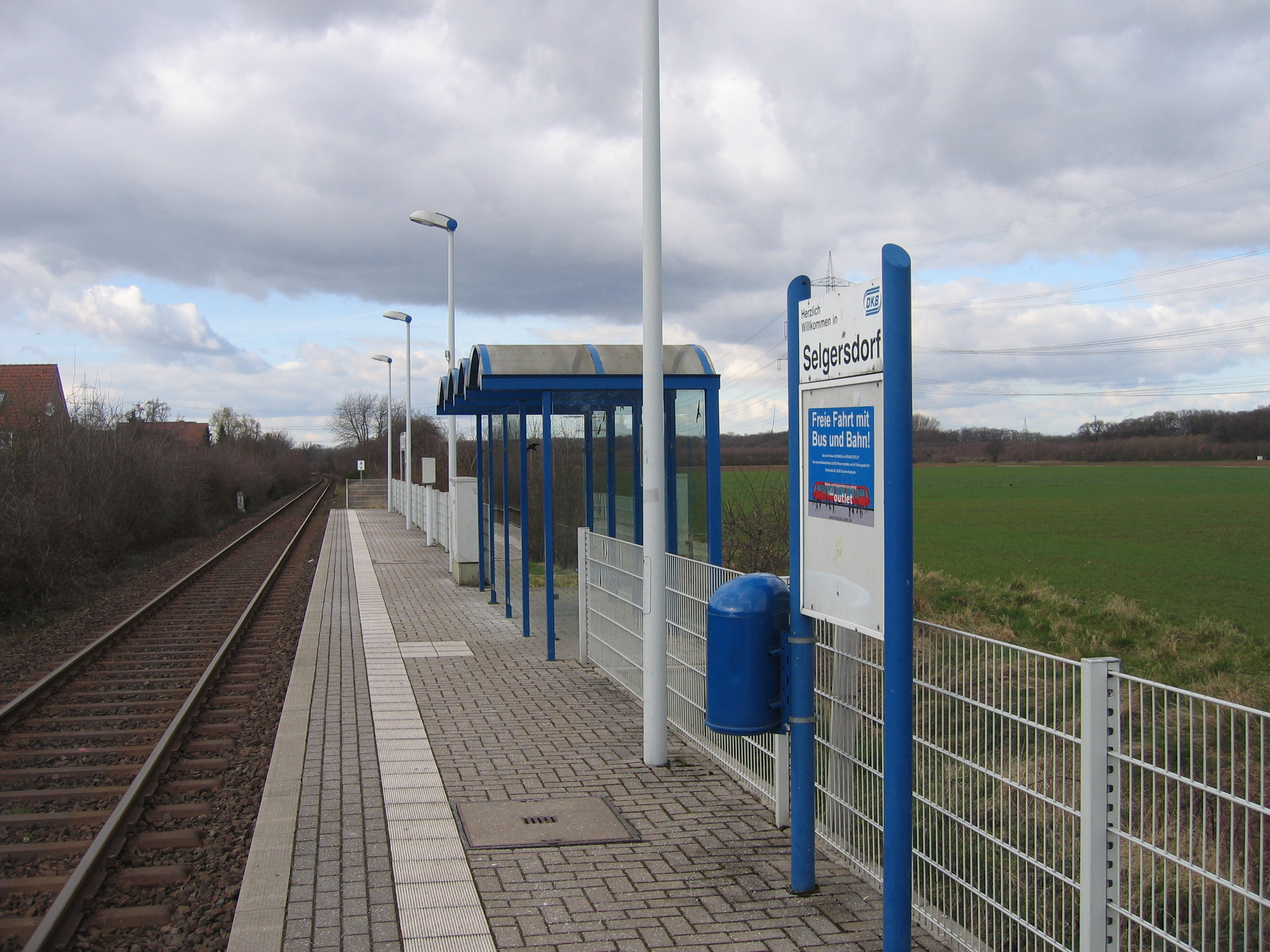 Haltepunkt Jülich-Selgersdorf an der Bahnstrecke Jülich–Düren.